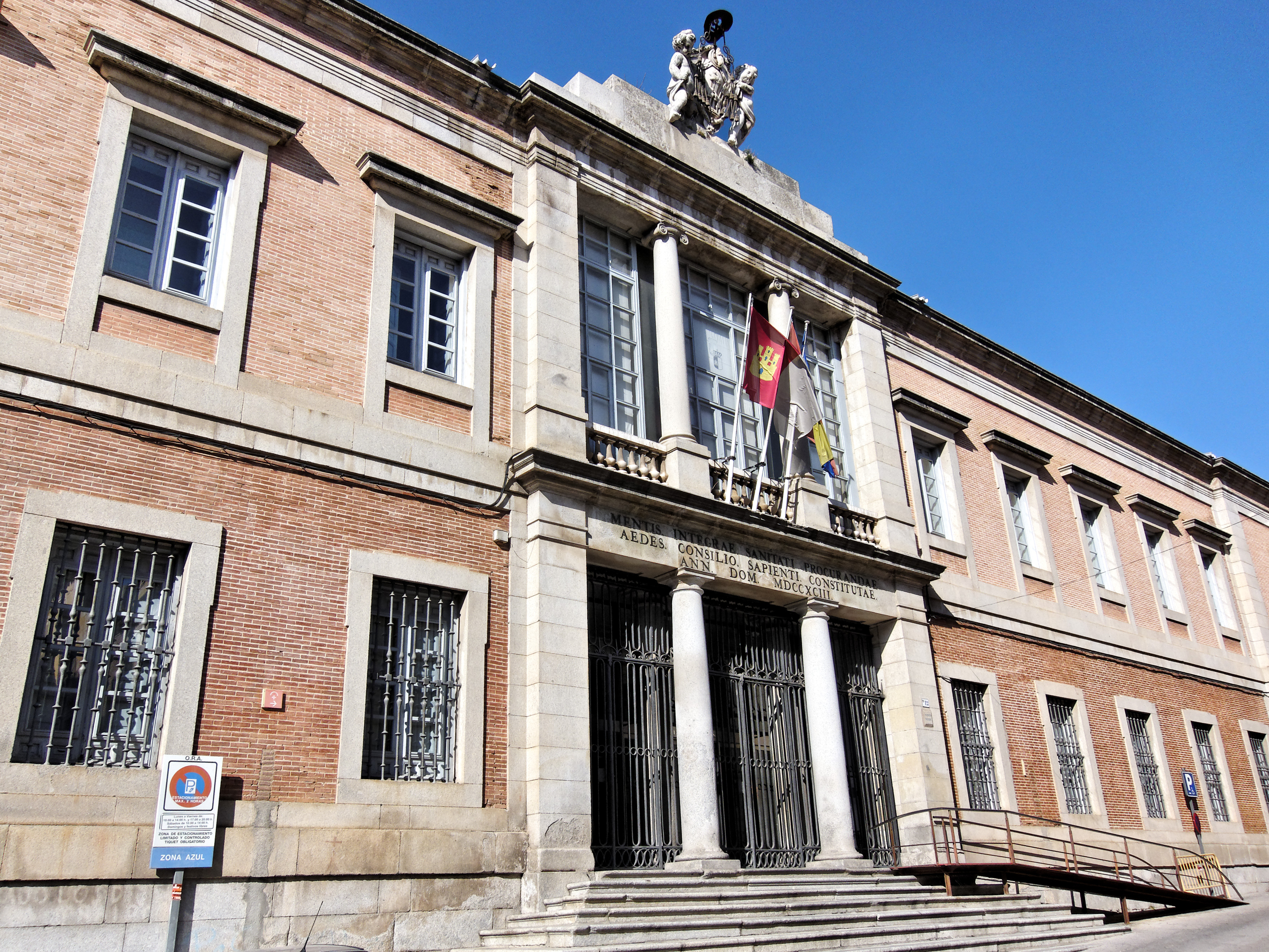 Fachada sur del Hospital Nuncio Nuevo. Toledo, España.